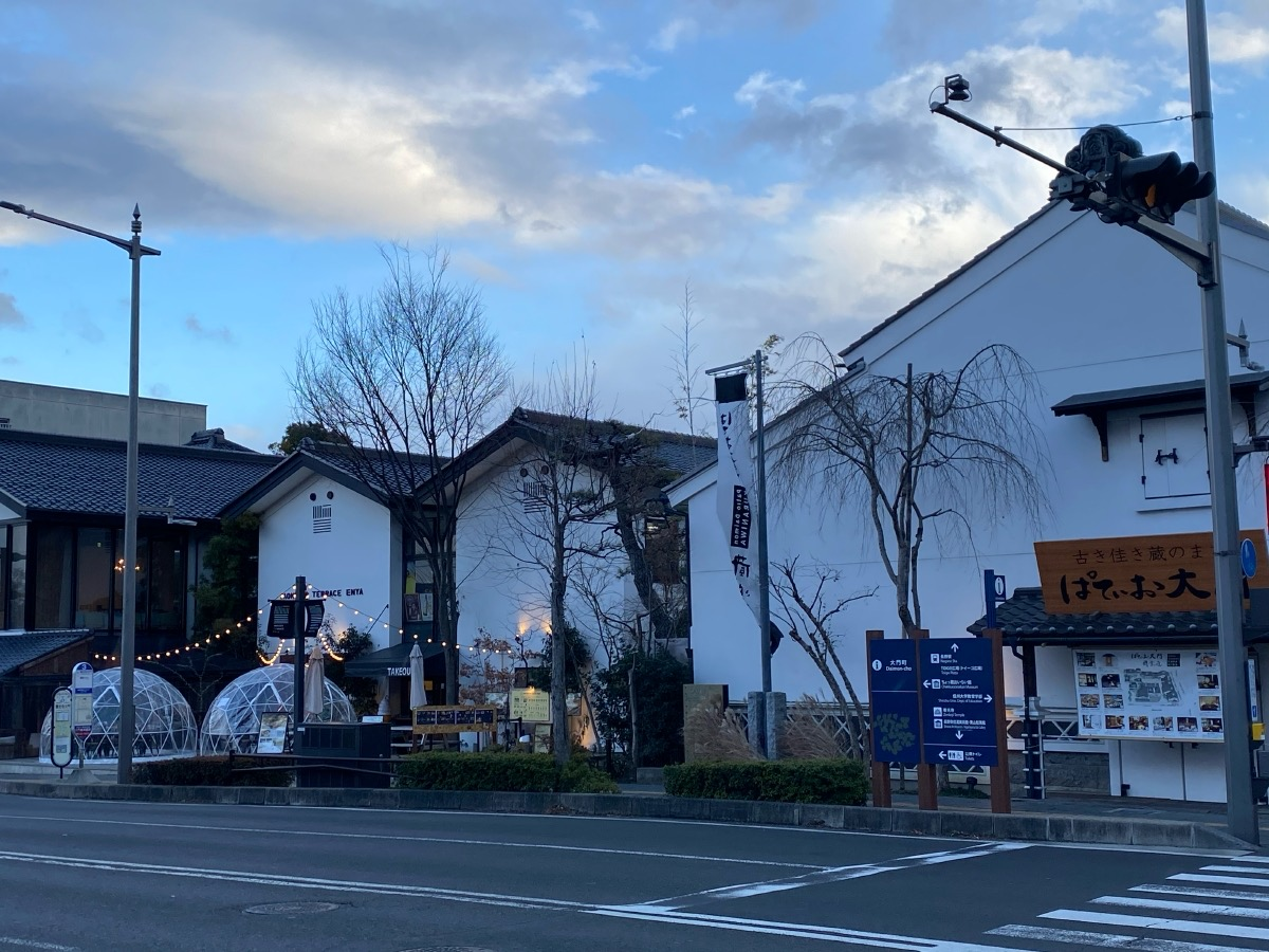 北側スクランブル交差点から見た景色